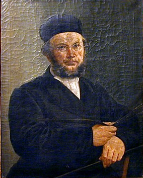 Lammers var prest, men virket også som maler og arkitekt.